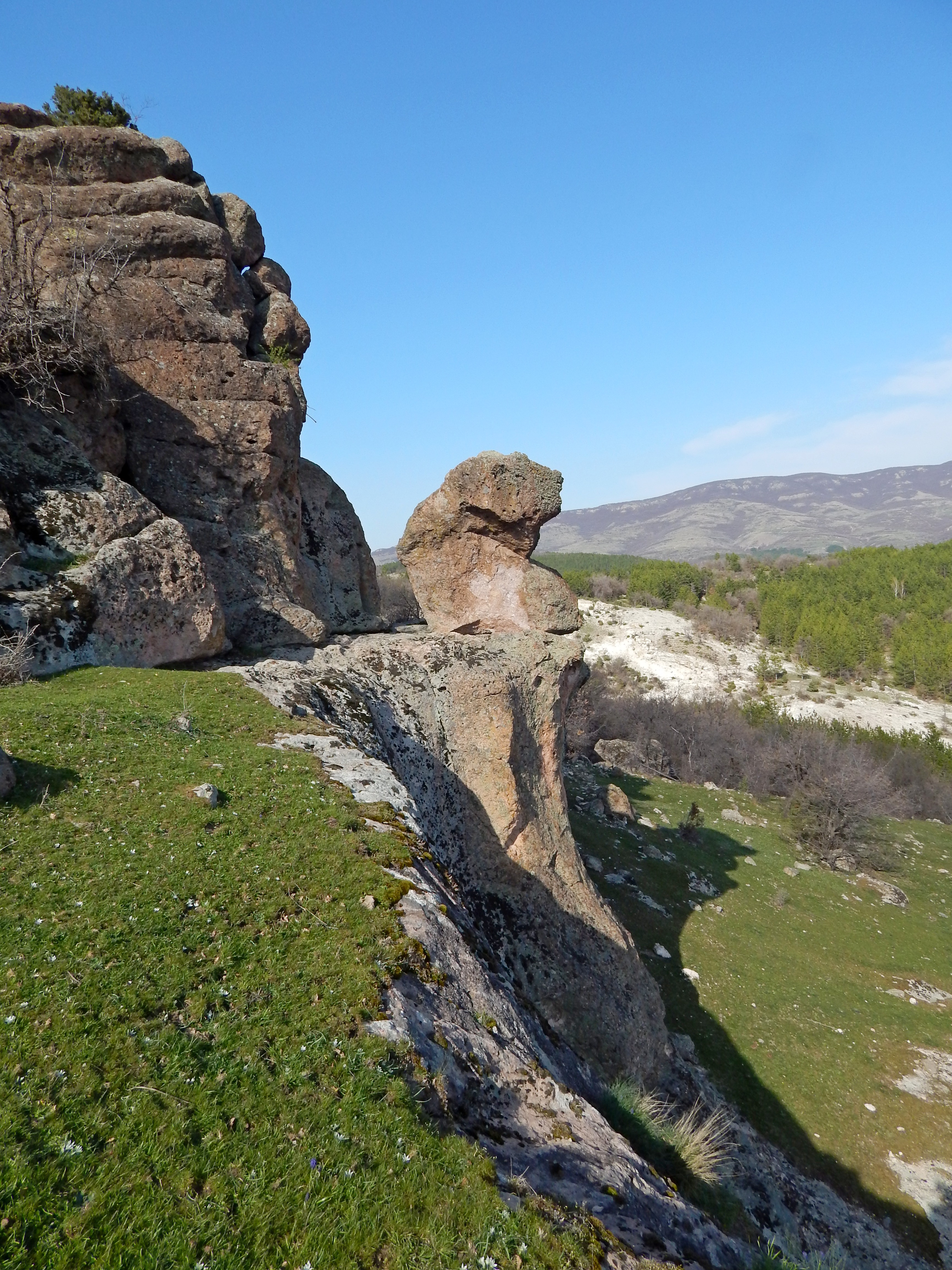 Светилището Харман кая се намира край с. Биволяне, Кърджалийско